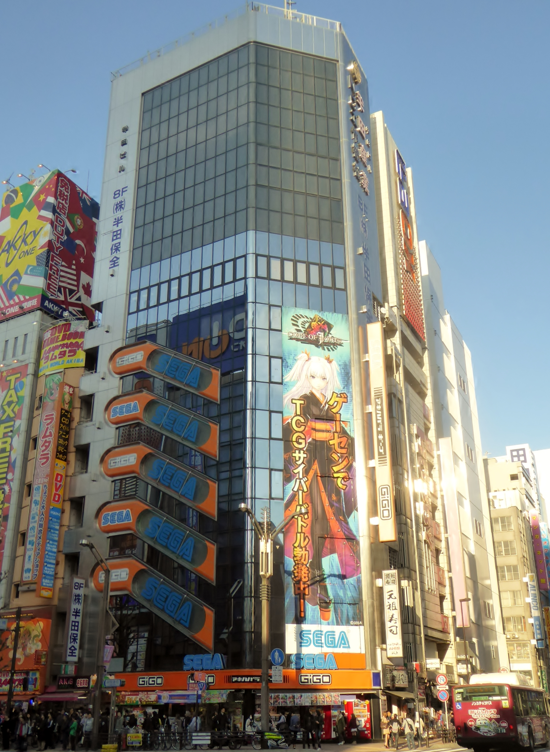 秋葉原GiGO（2017年8月11日よりセガ秋葉原2号館）を撮影。